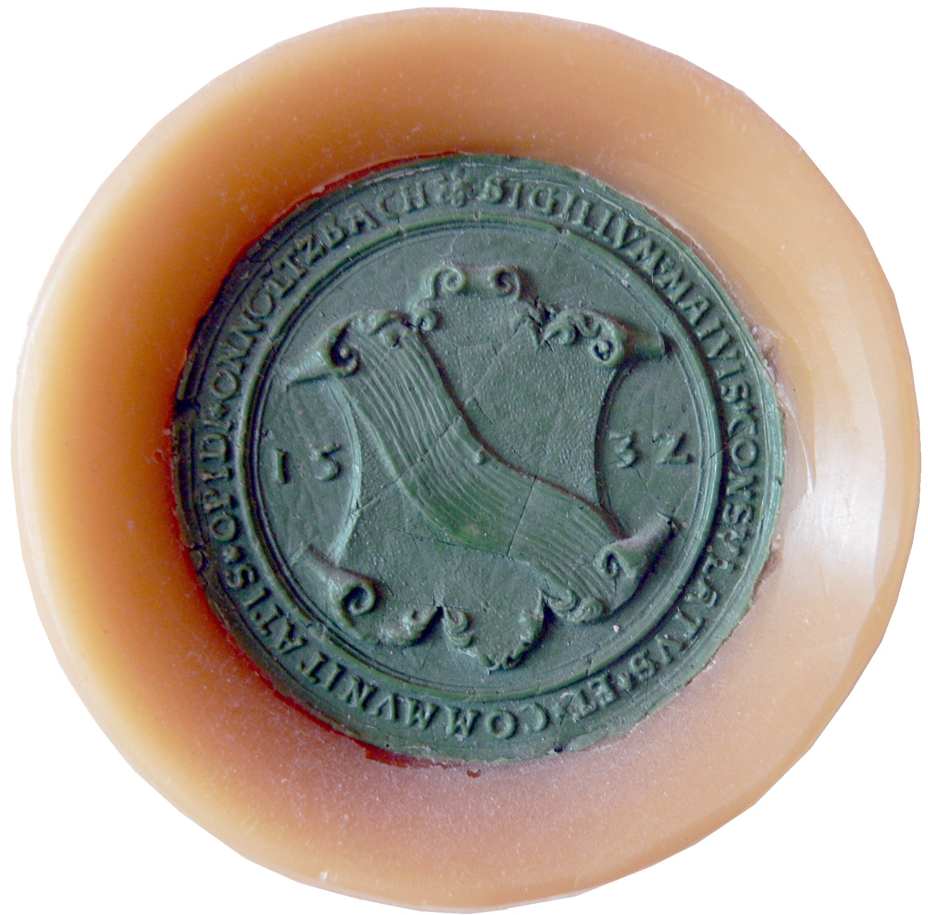 Stadtsiegel von Ansbach mit Stadtwappen. Umschrift:"Sigillum Maiuis Consulatus et Communitatis Oppidi Onnoltzbach".